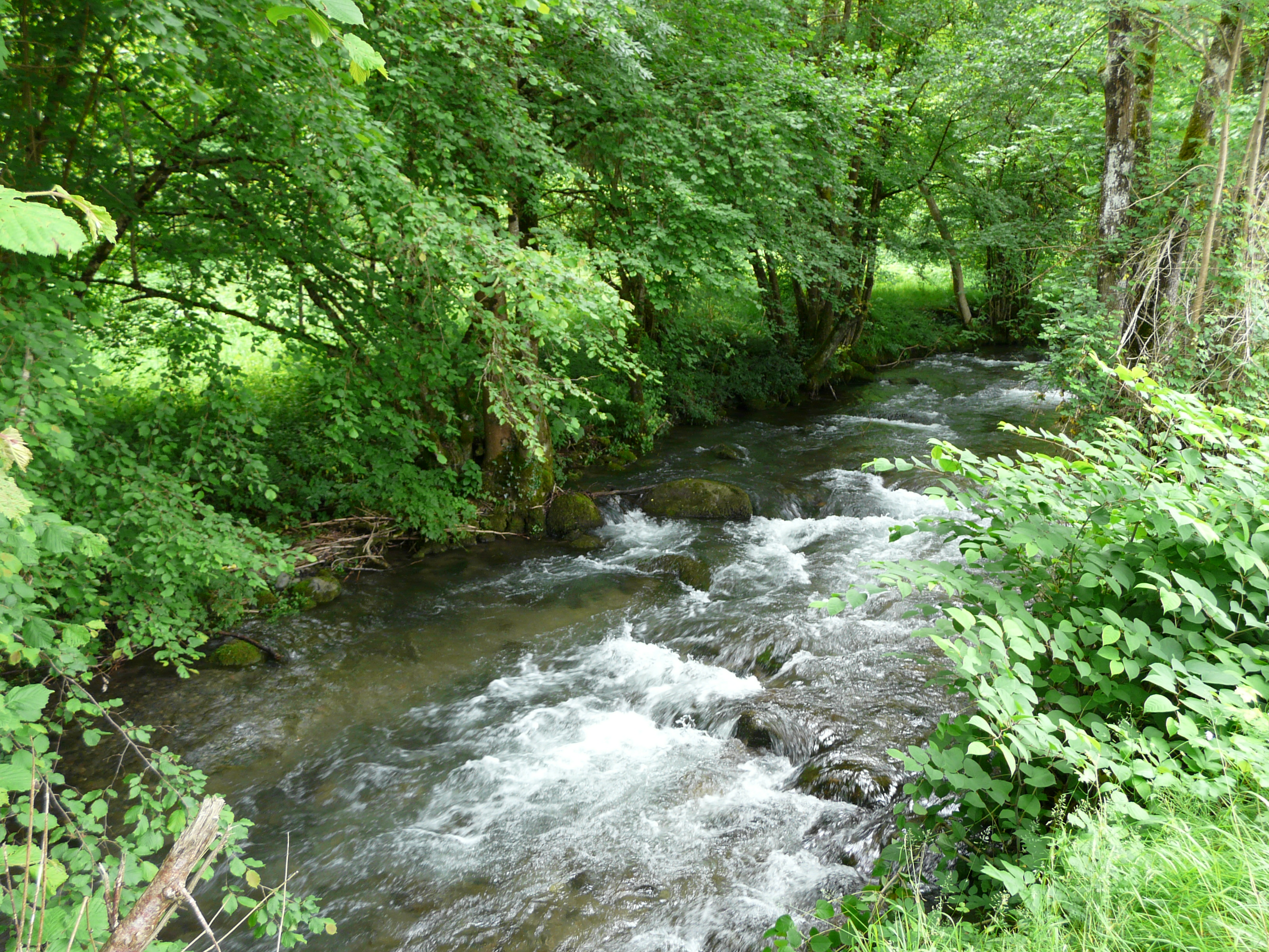 L'Ourse de Ferrère au niveau de la passerelle, Ourde, Hautes-Pyrénées, France. Vue prise en direction de l'amont.